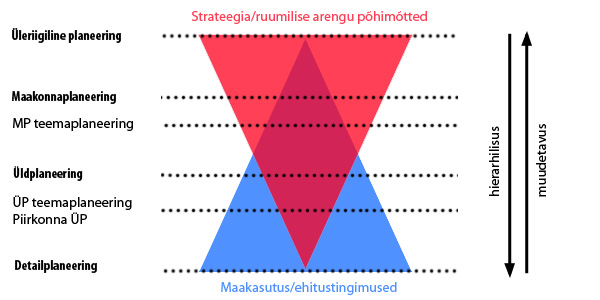 Ruumilise planeerimise tasemed